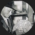 Zdislav Hercík (1893-1968), český malíř, keramik a loutkář